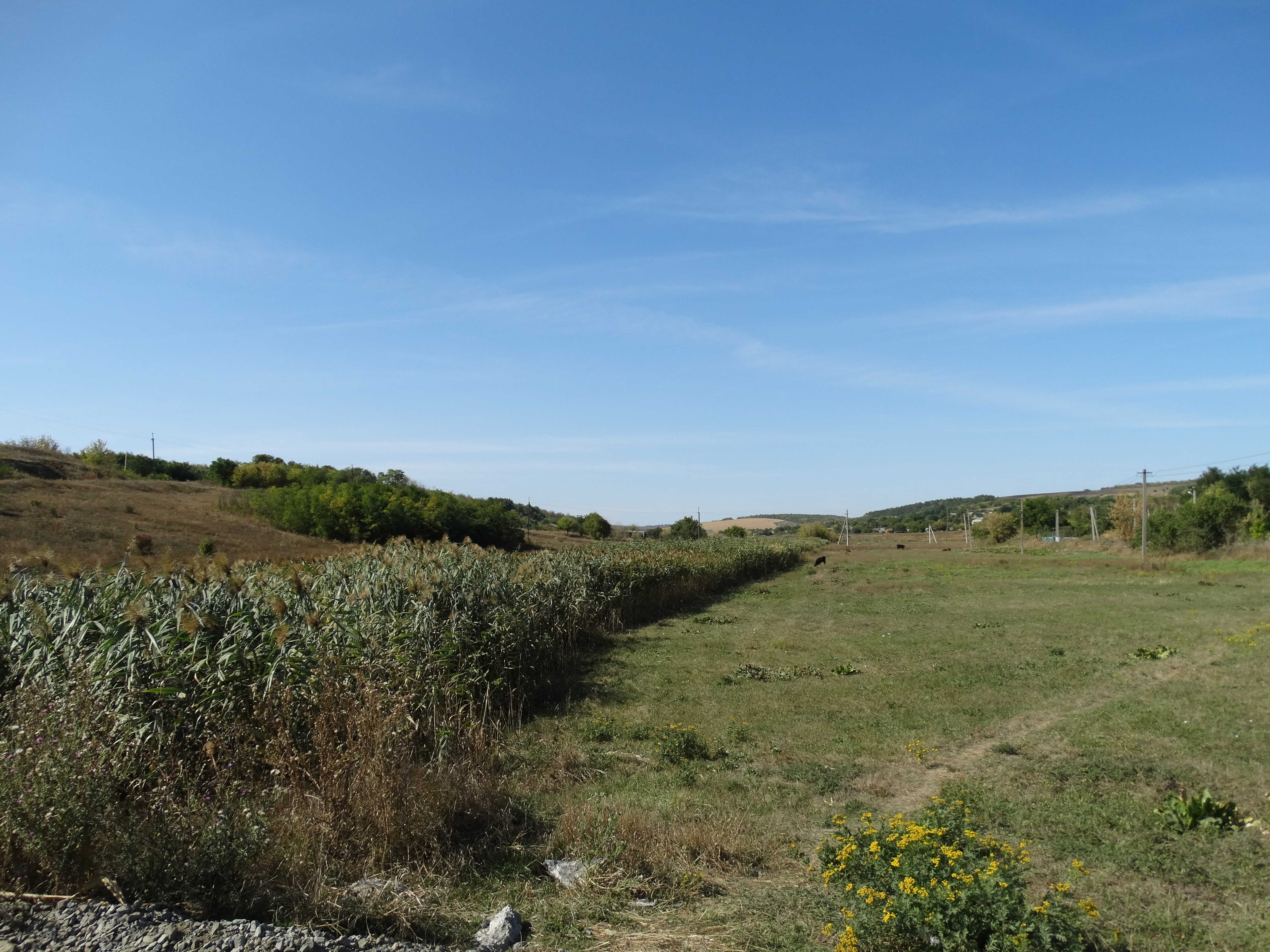 Вікіекспедиція на північ Одещини